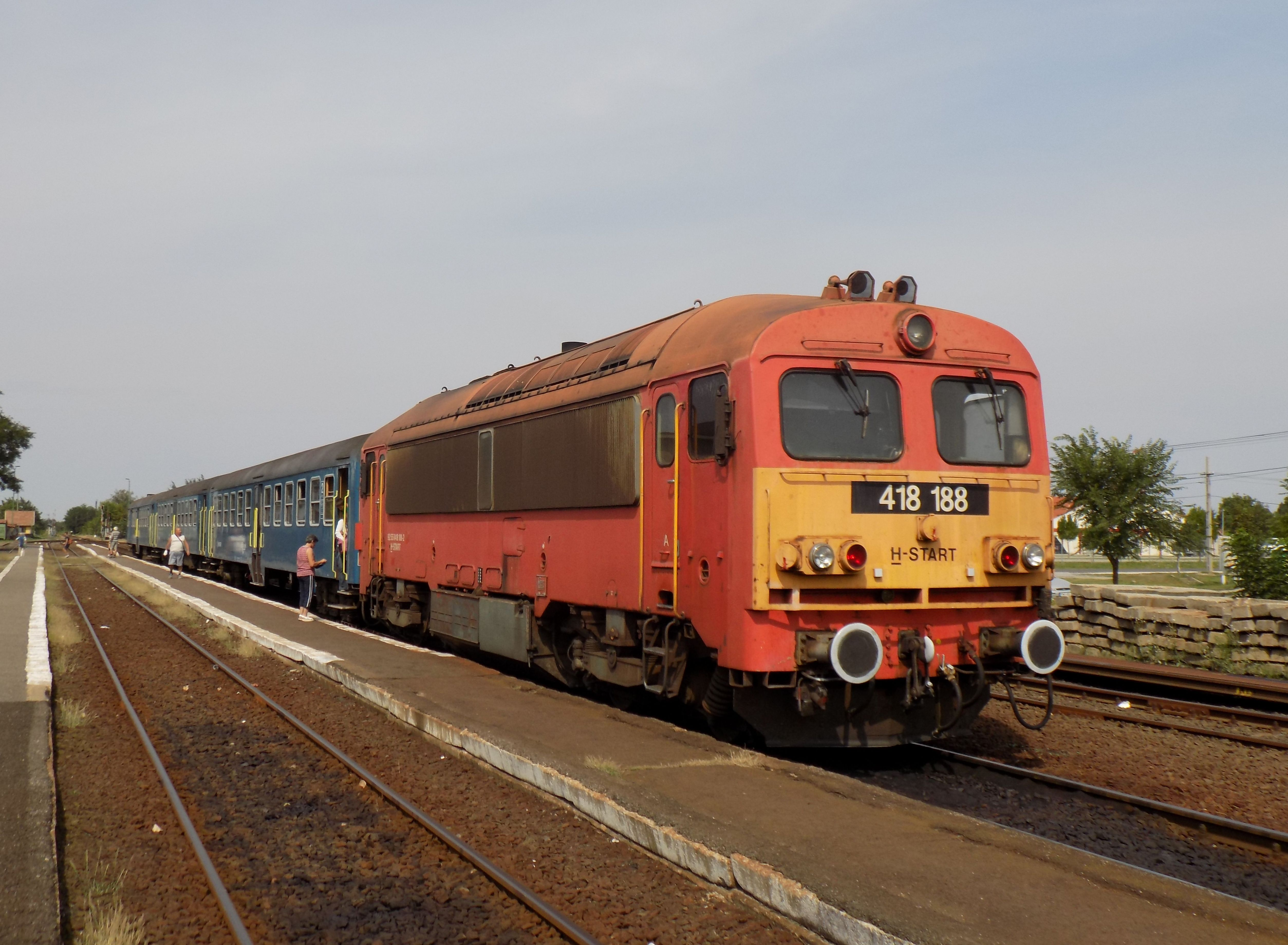 A MÁV egyik 418-as mozdonya Balmazújváros vasútállomáson